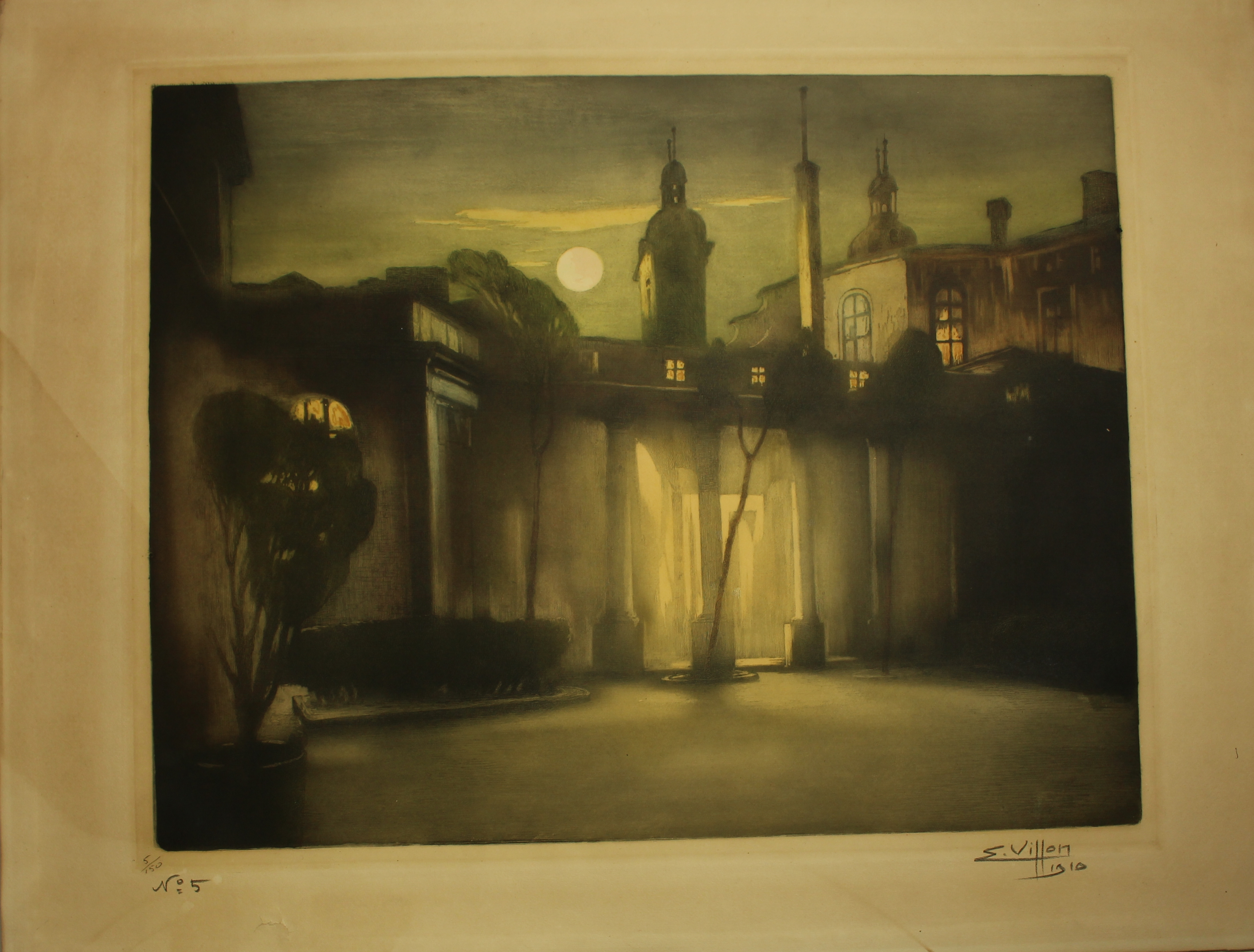 Cour des cuisines au crépuscule de l'Hôtel-Dieu de Lyon, aquarelle ou gouache d'Eugène Villon, 42x53 cm, 1910, n° d'inventaire 2007.0.928.M Signé, daté, numéro de série. Propriété : musée des Hospices Civils de Lyon (achat)